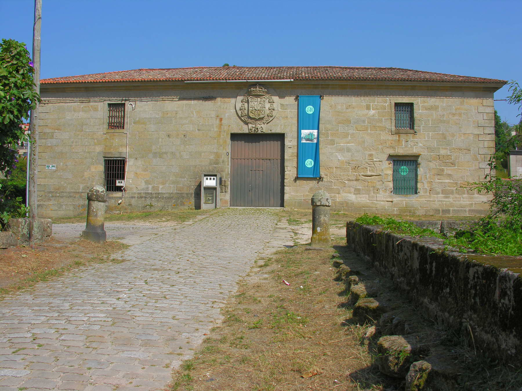 Almacéns da renda do tabaco, Pontecesures, Galicia Publish by= Luis Miguel Bugallo Sánchez. Self made.